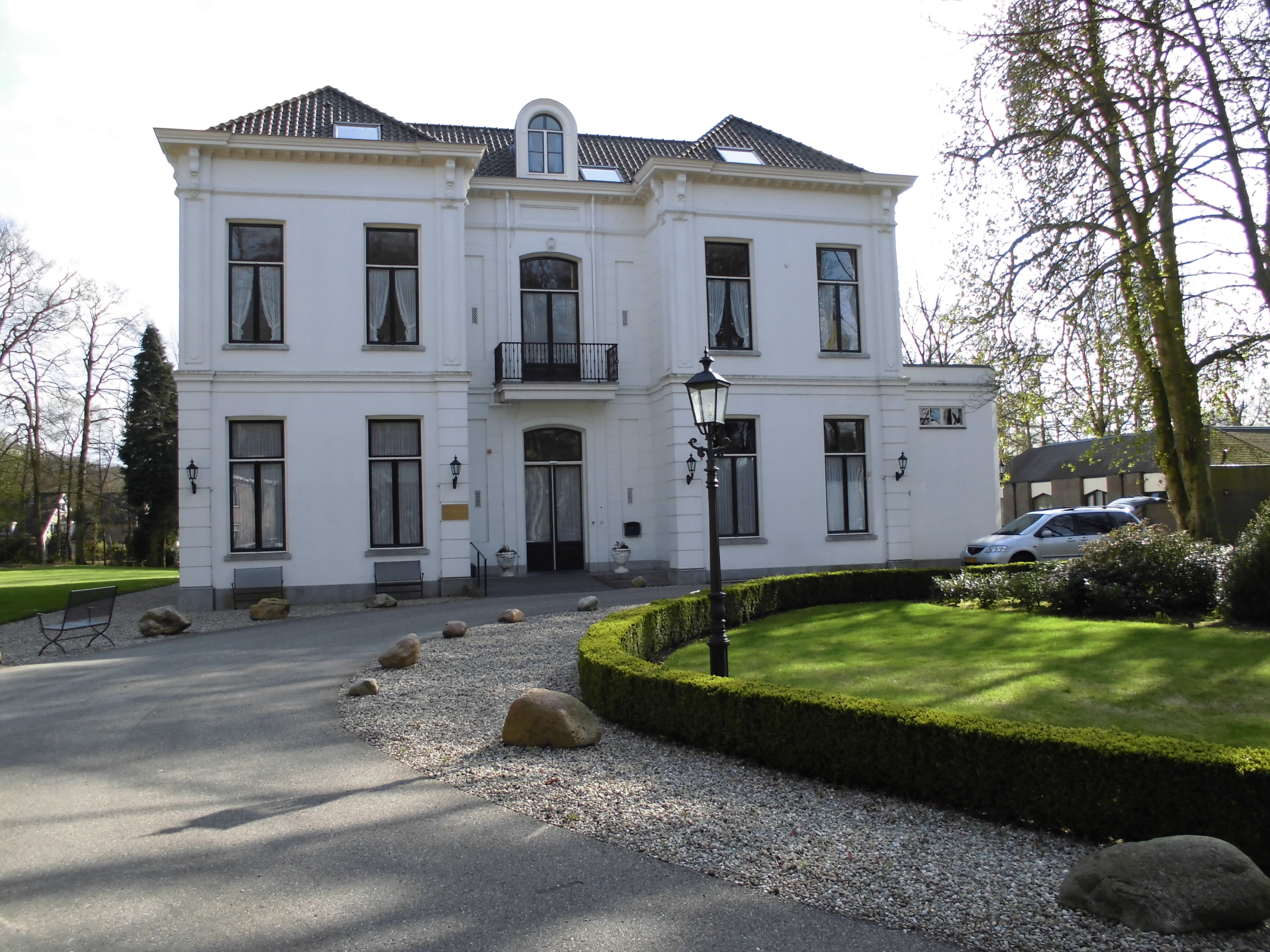 Schoonoord, Postweg 18 Doorn